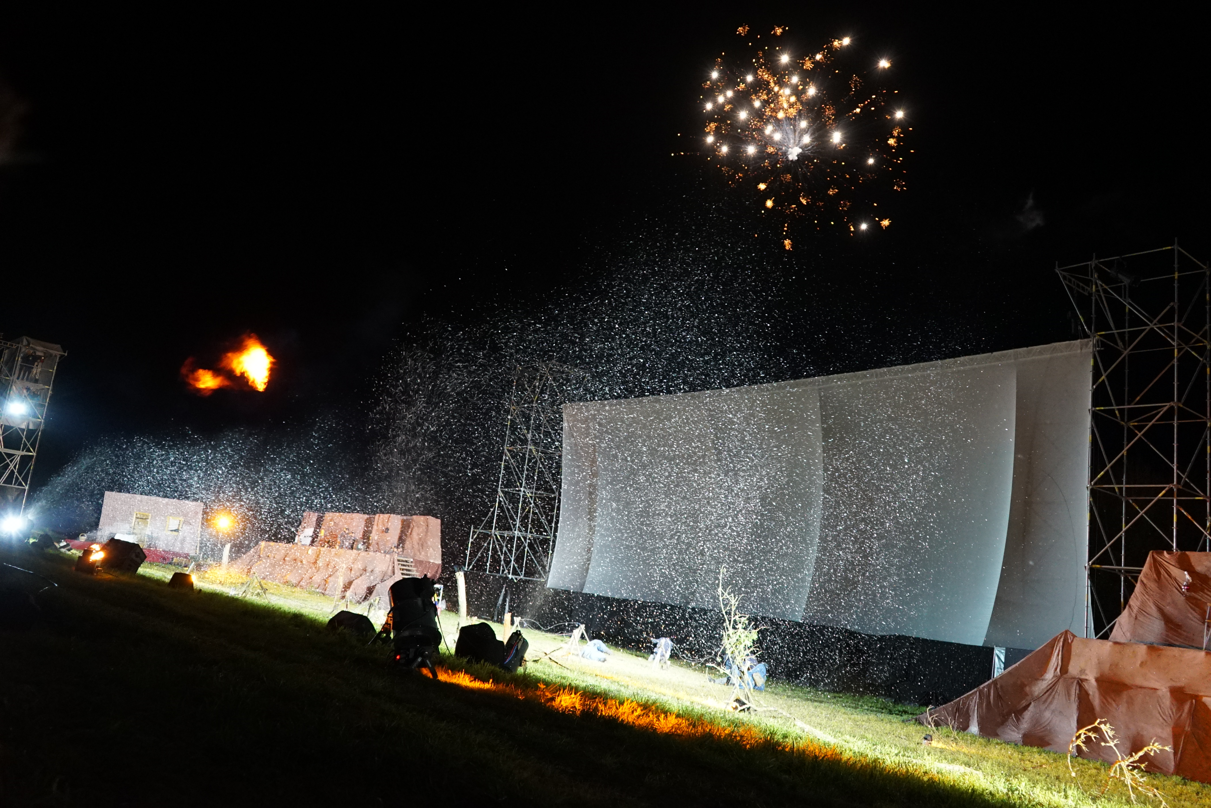 commémorations du centenaire de la bataille du Chemin des Dames lors de l'offensive Nivelle.